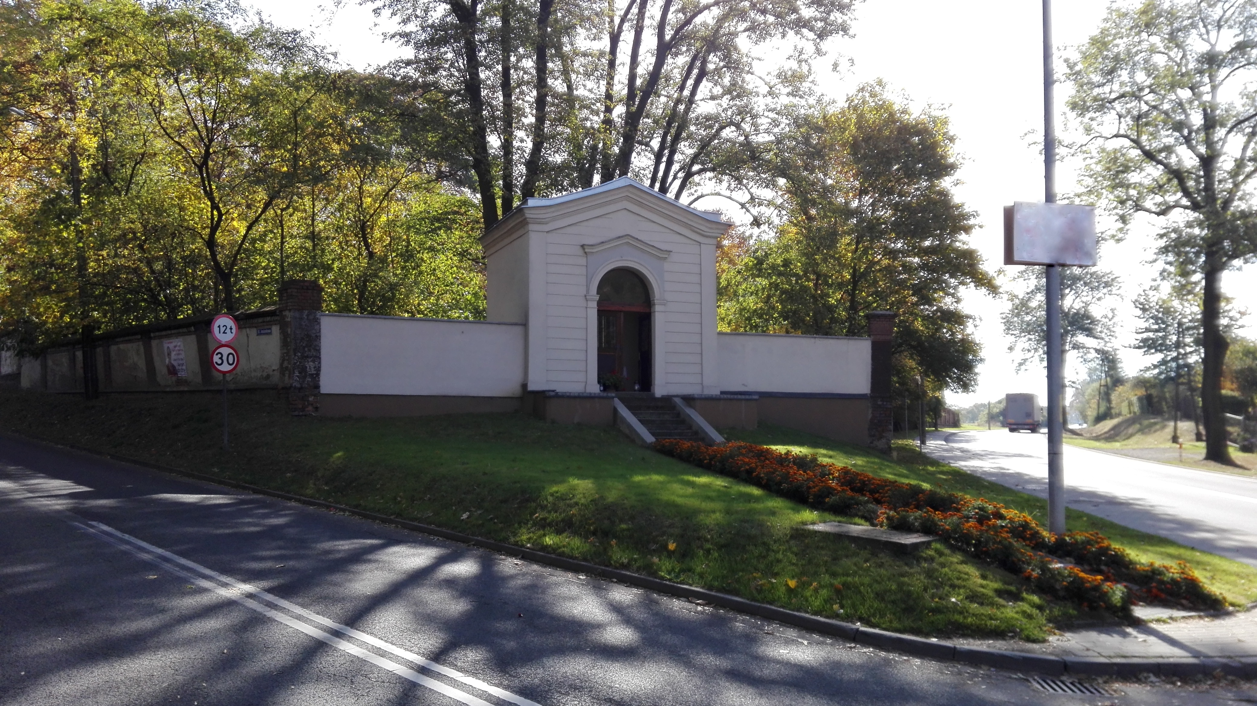 Prudnik, kapliczka przydrożna z ok. 1750 r. przy ul. Jesionkowej (róg Wiejskiej)